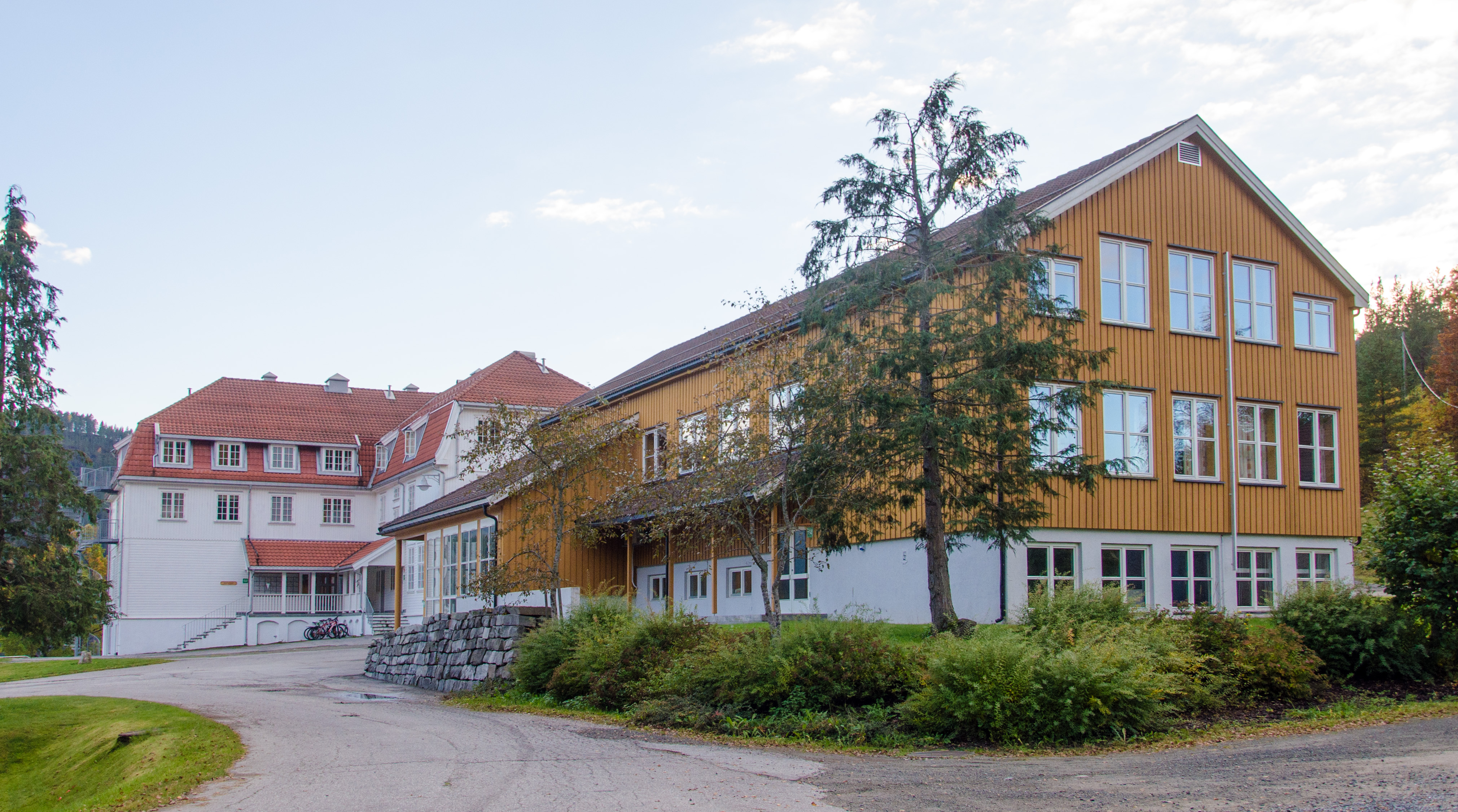 Kvitsund Gymnas